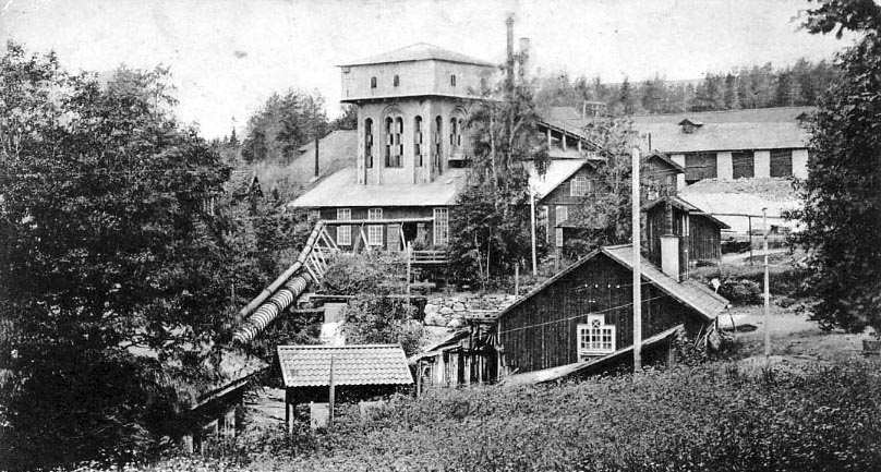 Lienshytte masugn